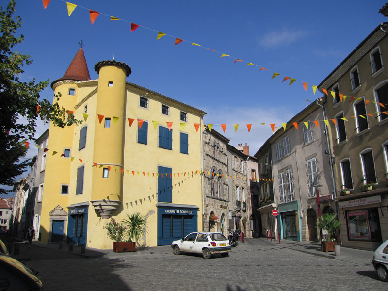 Brioude, cliché personnel, été 2005. 600 X 800 pixels